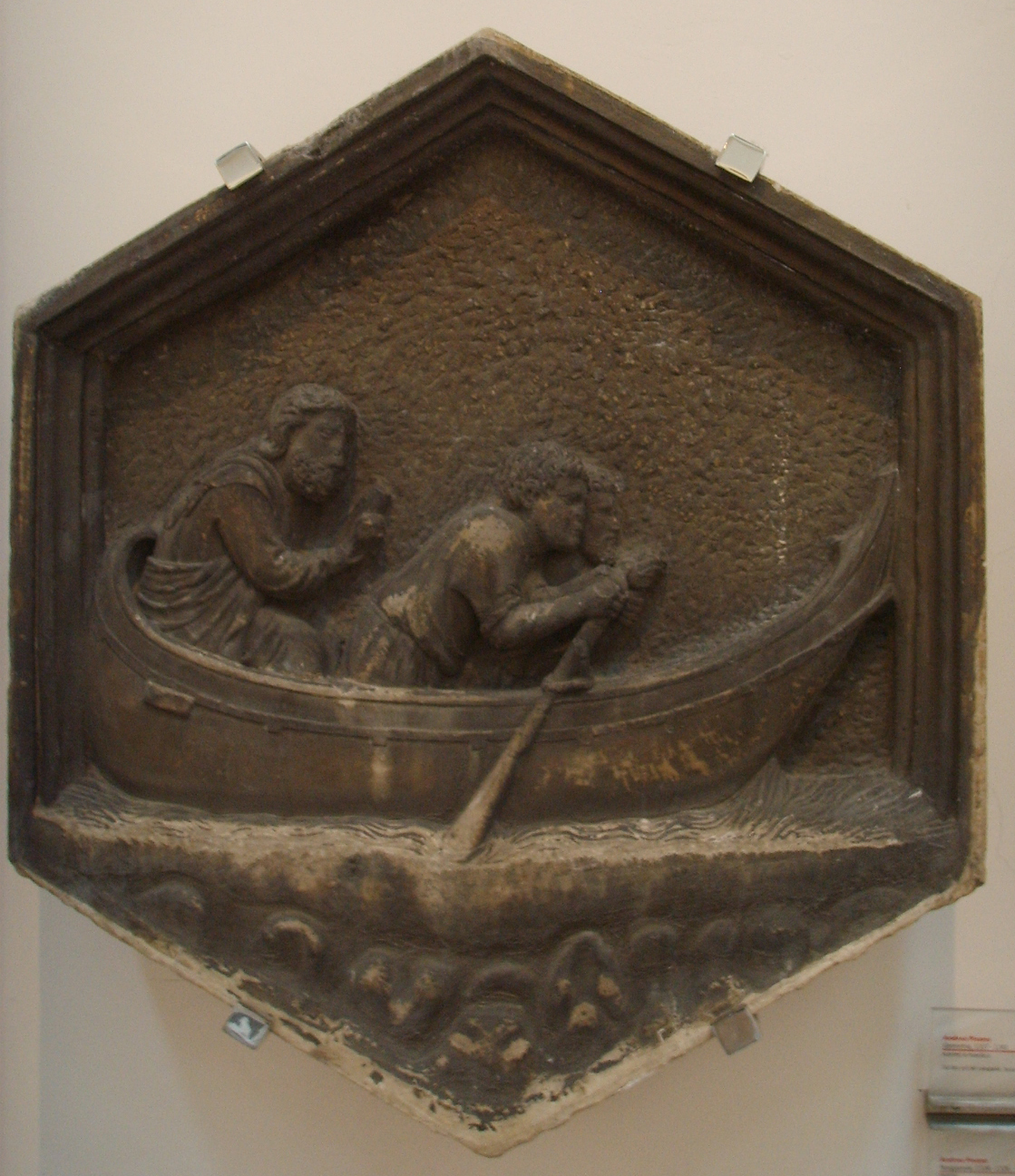 Formella 15, navigazione, andrea pisano, 1334-1336